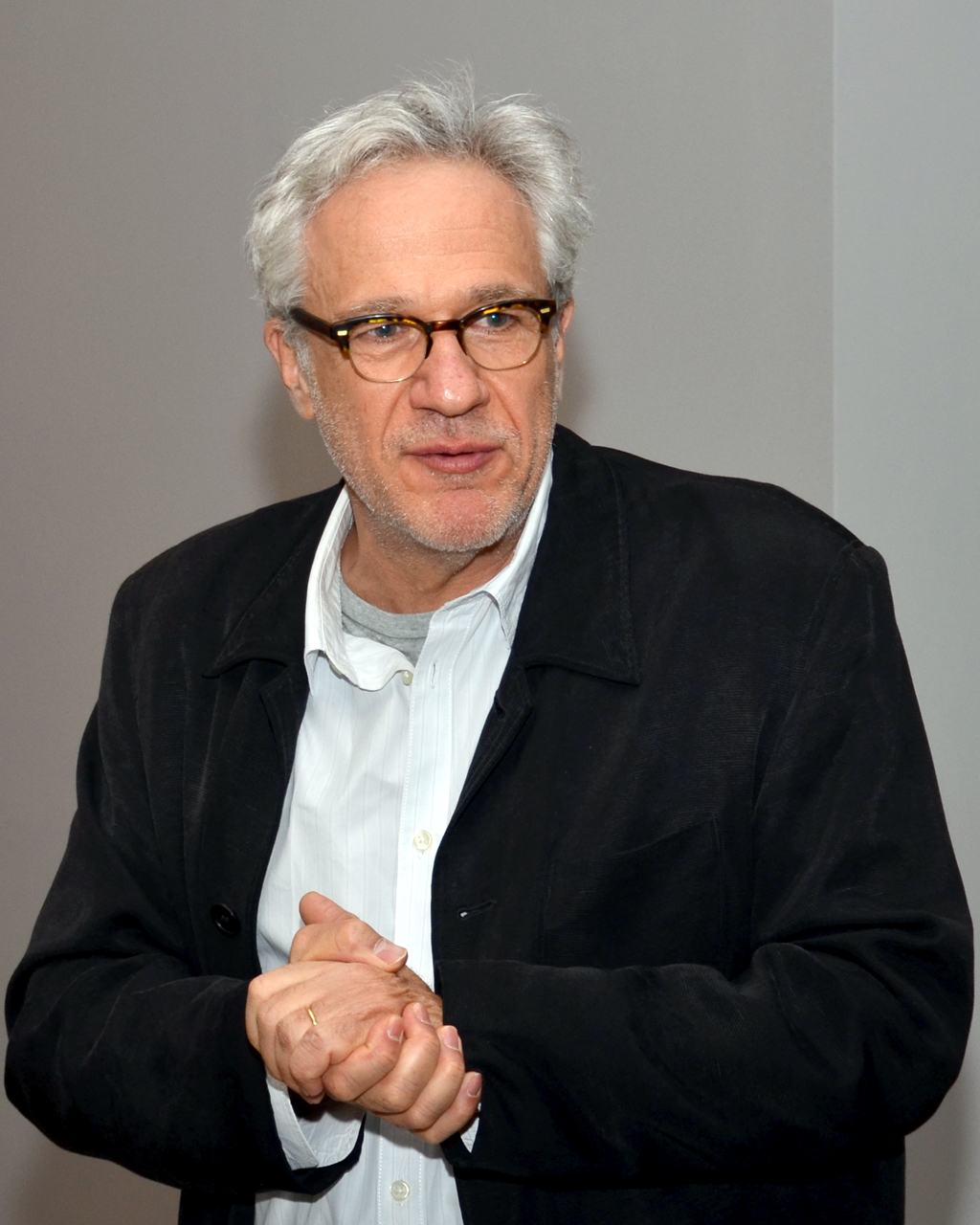 Bruno Decharme (2015)